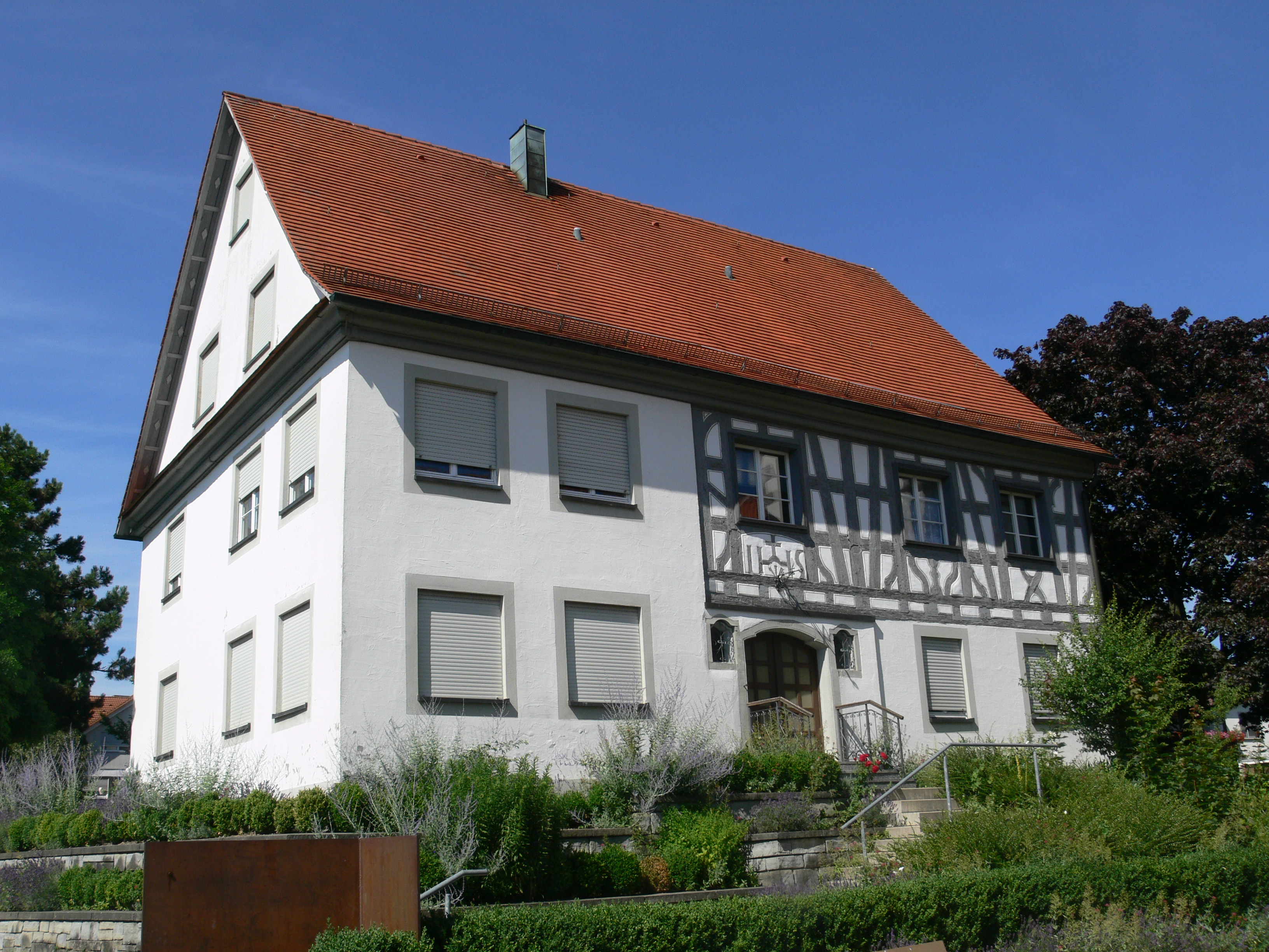 Ailingen, Stadt Friedrichshafen, Bodenseekreis: Altes Pfarrhaus